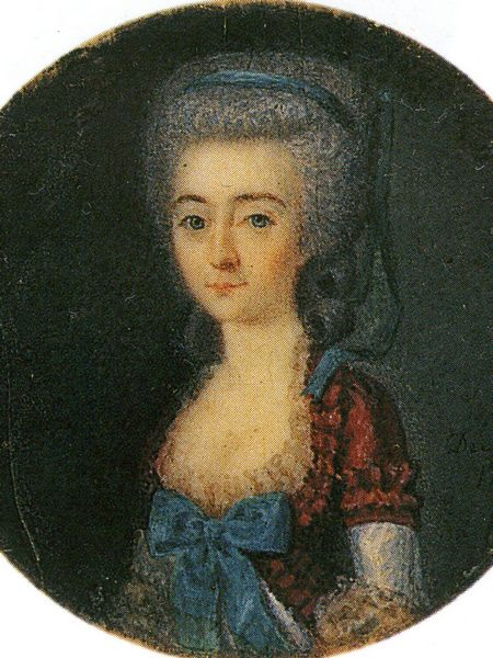 Ирина Михайловна Щербатова, ур. Спиридова (1757 - 1827).